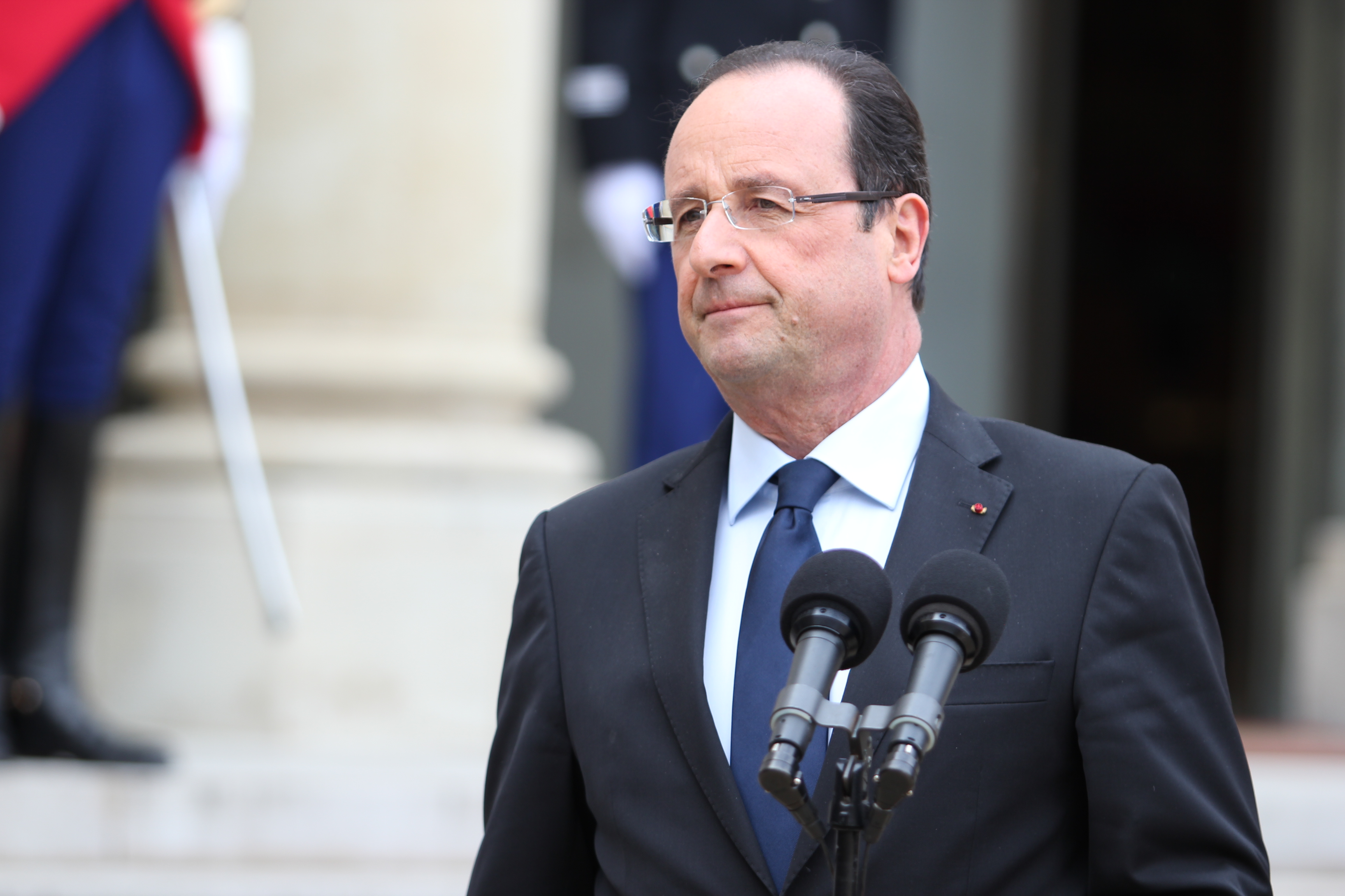 Ministru prezidents Valdis Dombrovskis Francijas galvaspilsētā Parīzē tiekas ar Francijas prezidentu Fransuā Olandu (Francois Hollande)